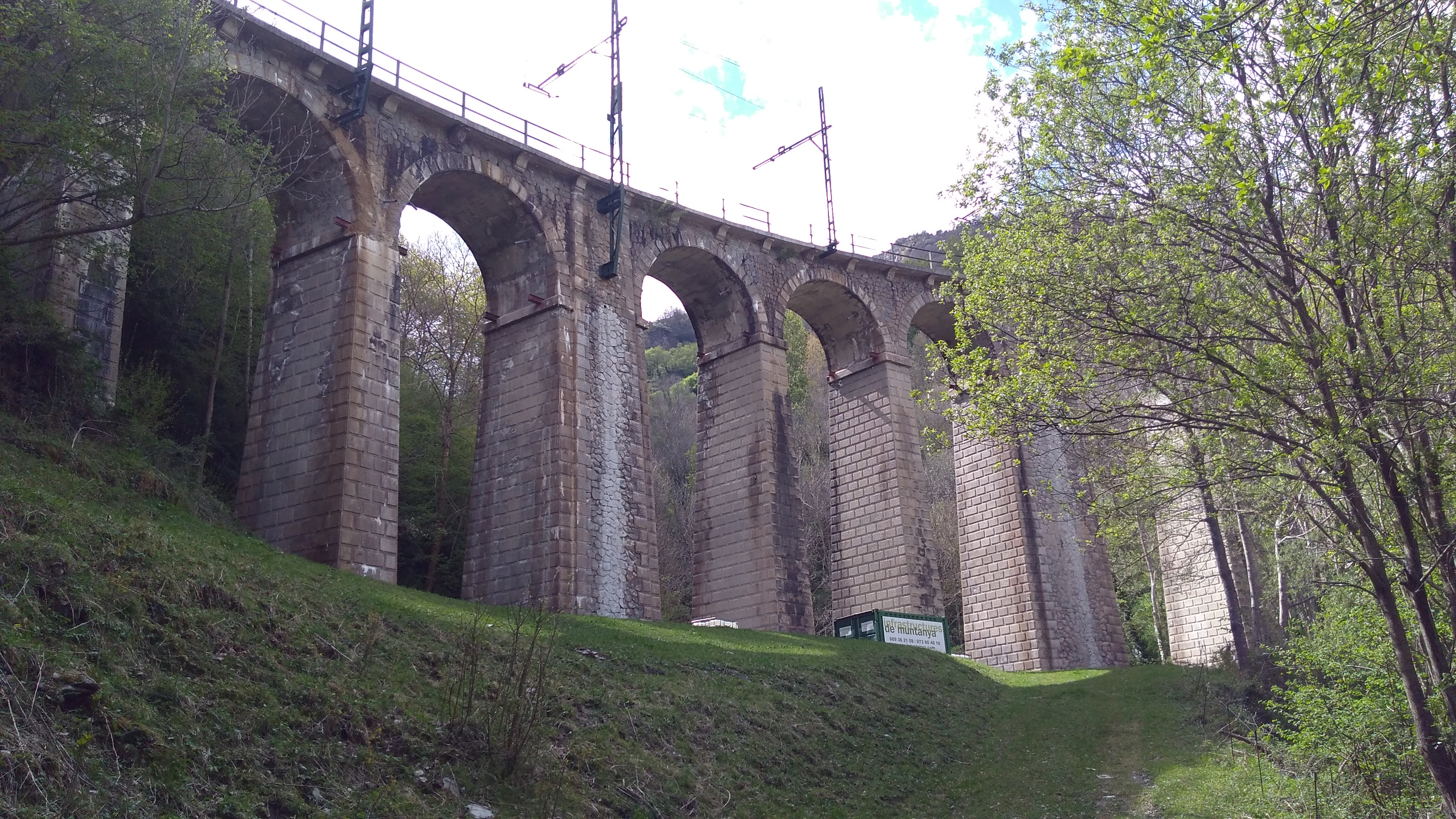 Viaducte de Tosa des de baix